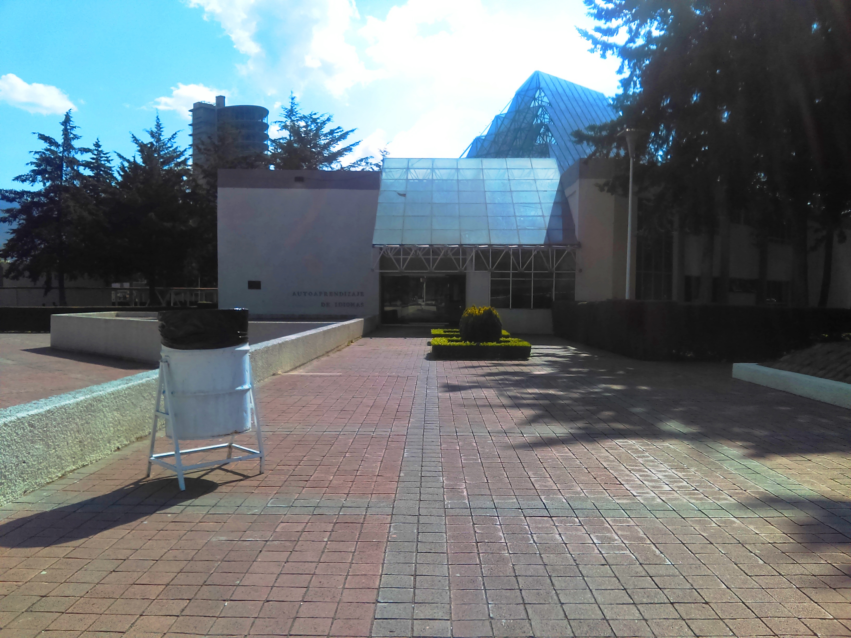 Ciudad del Conocimiento de la UAEH